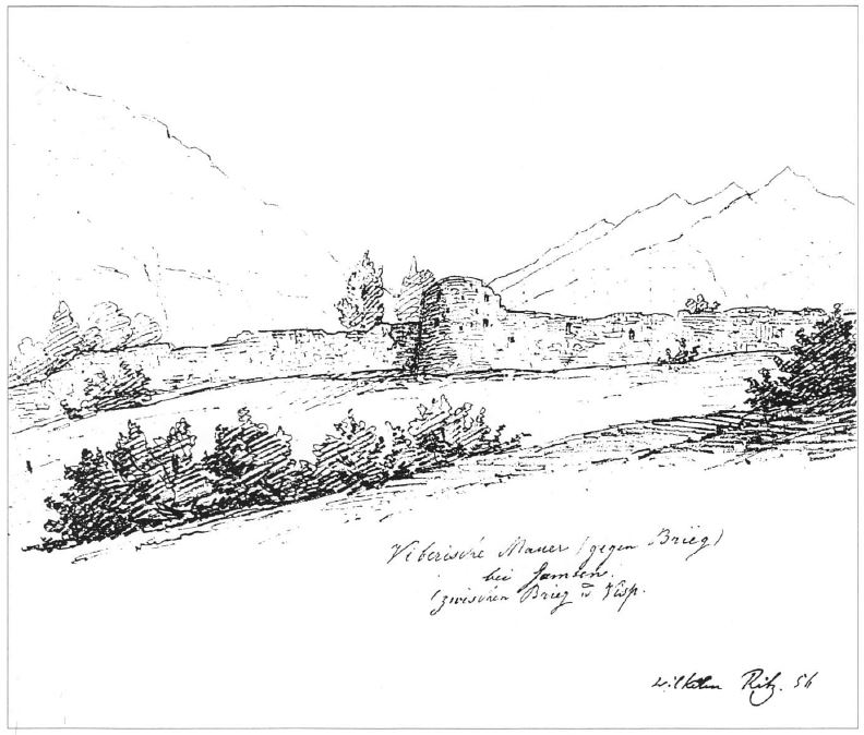 Landmauer (gegen Brig) bei Gamsen VS, Schweiz, Zeichnung von Wilheln Ritz 1856